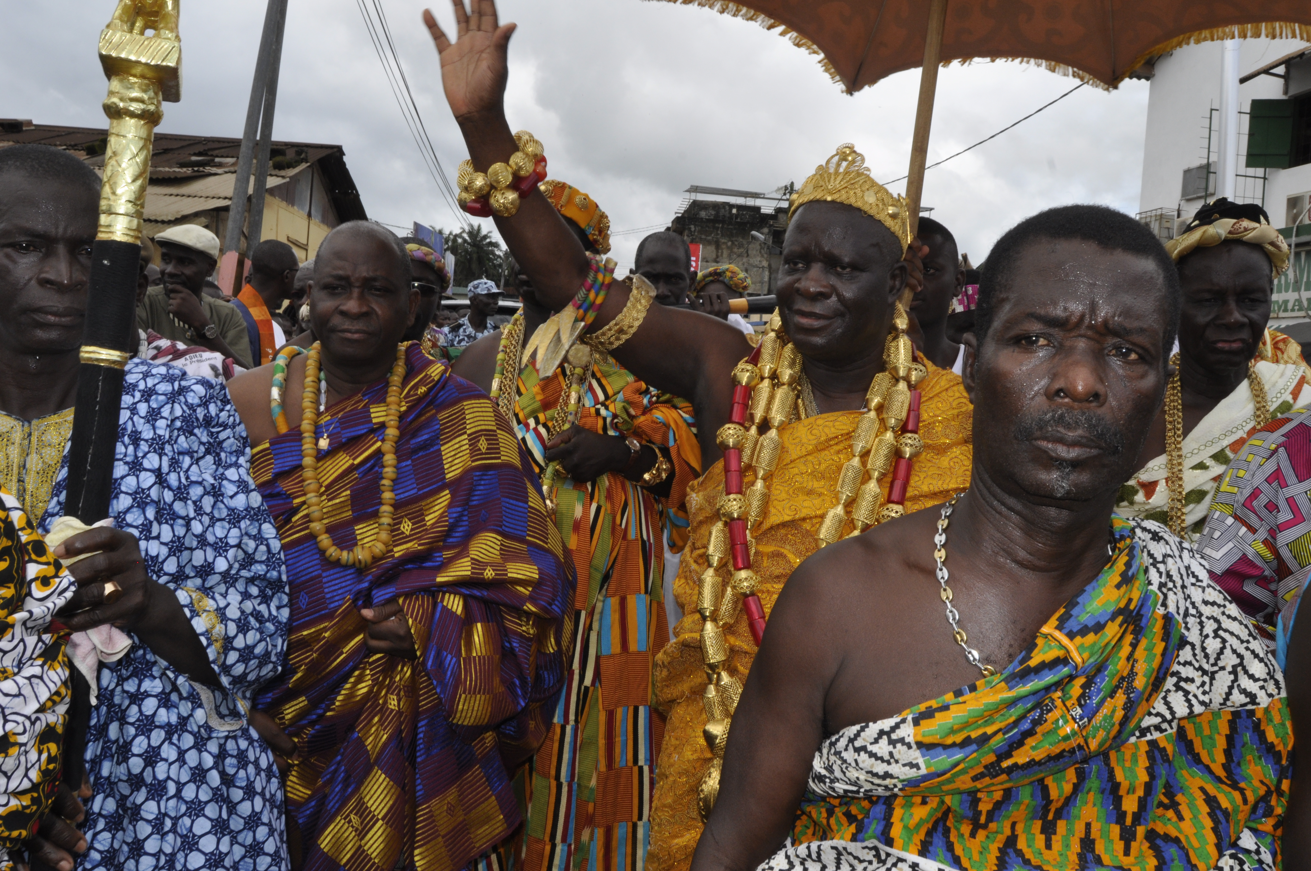 Le roi du Sanwi à l'occasion d'une sortie publique